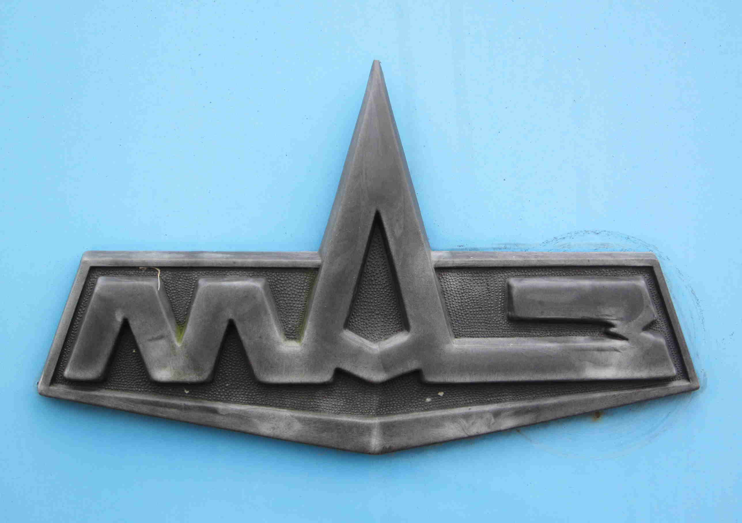 MAZ Logo ca. 1995